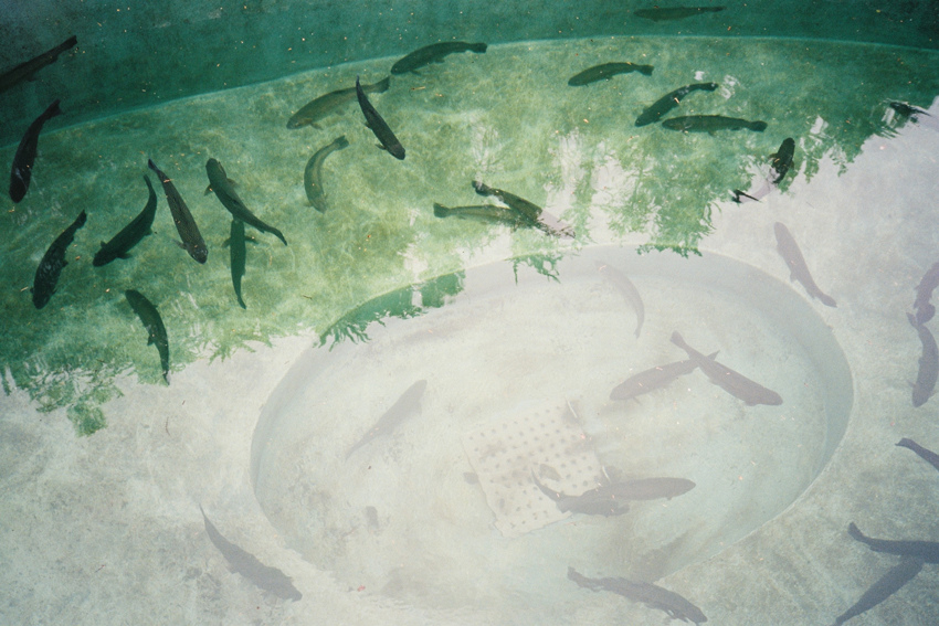 Trutas, Madeira